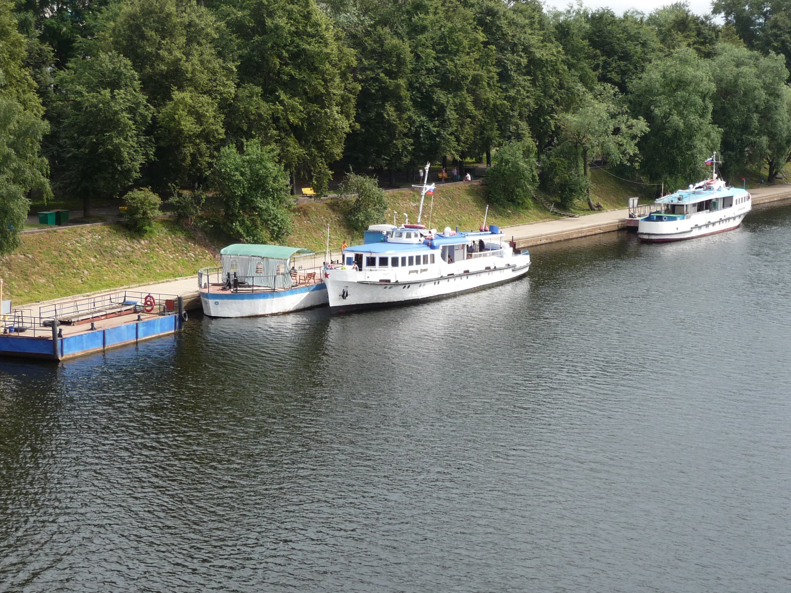 Прогулочные корабли у пристани в Пскове